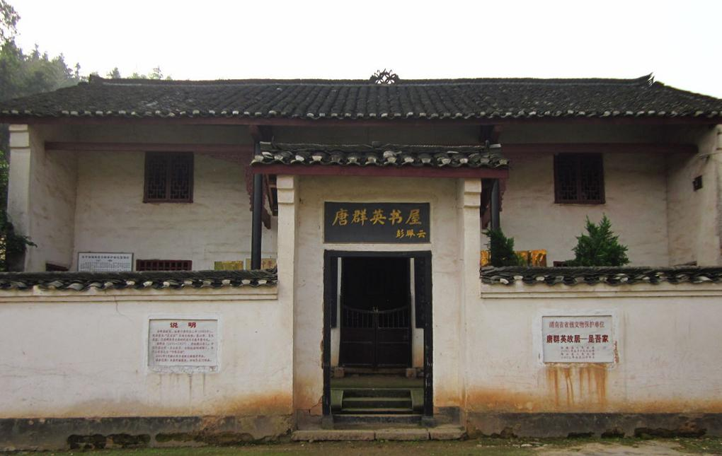 唐群英故居